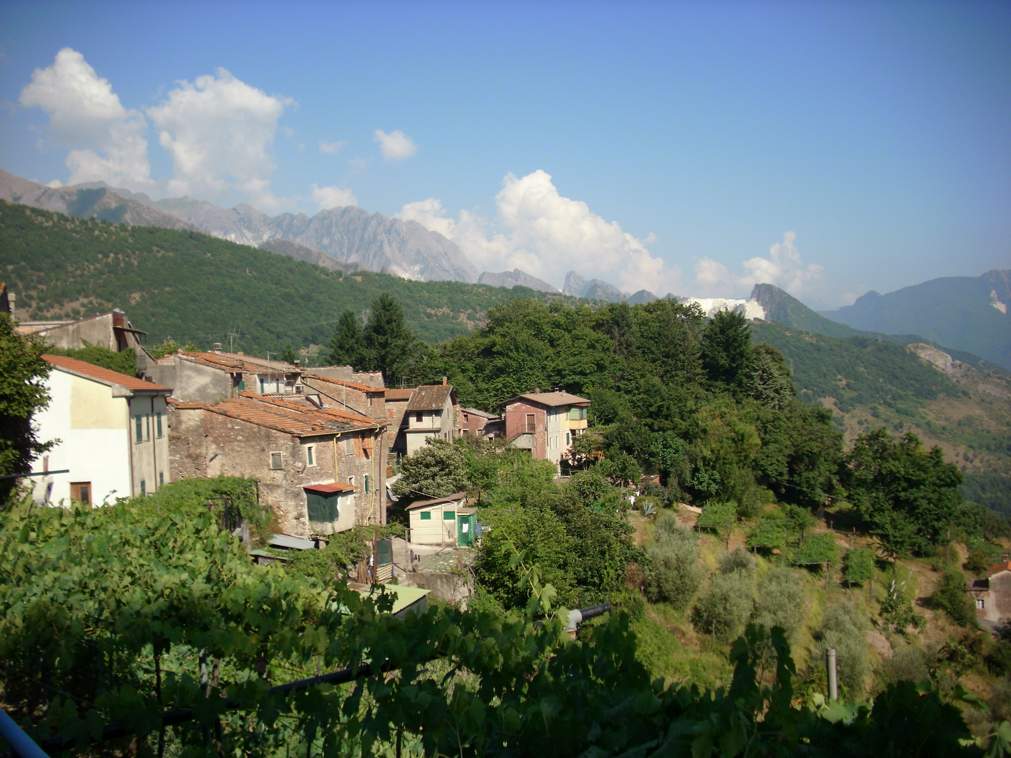 panorama view mountain